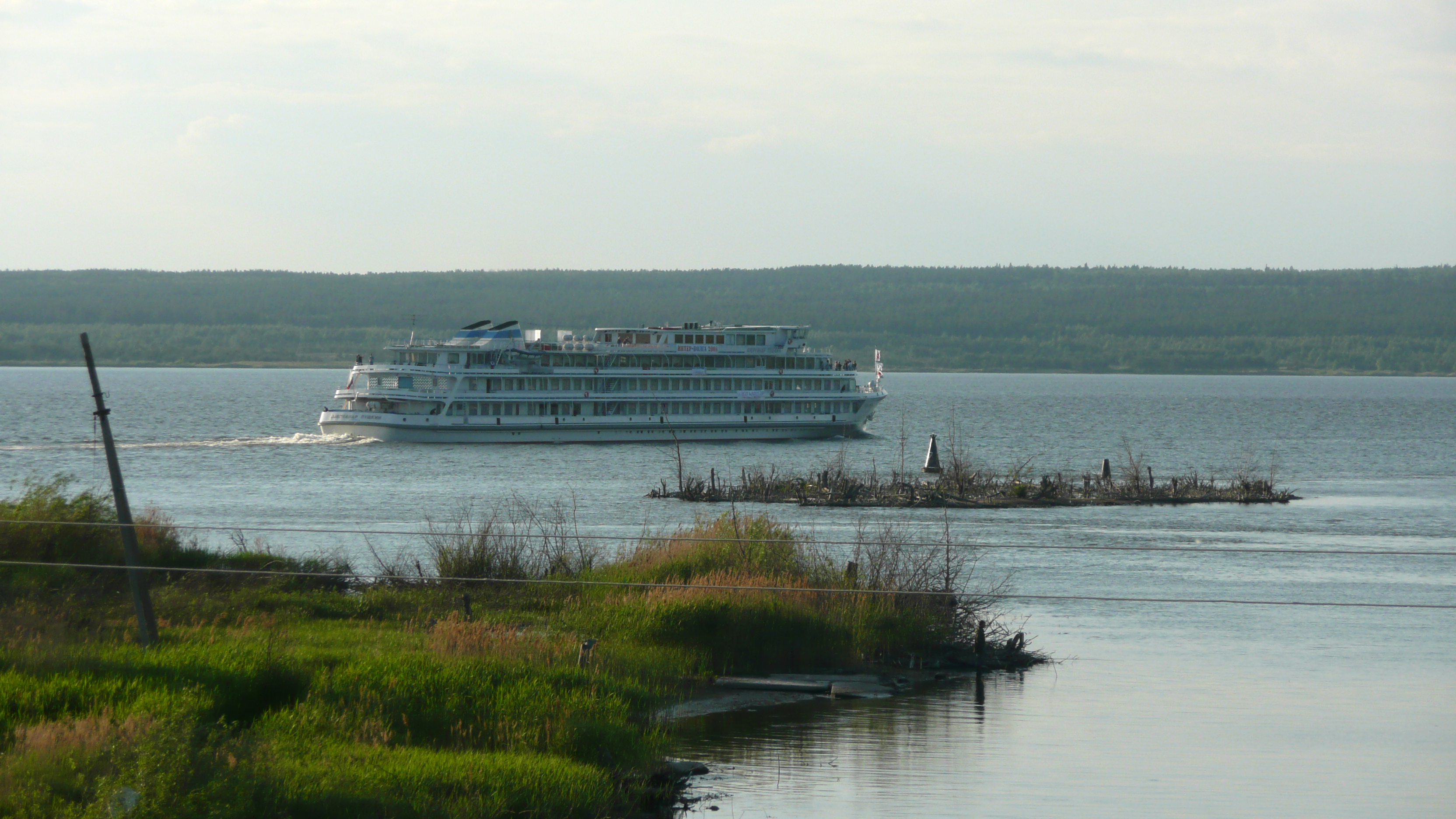 Nishnekamsk reservoir near Naberezhnye Chelny